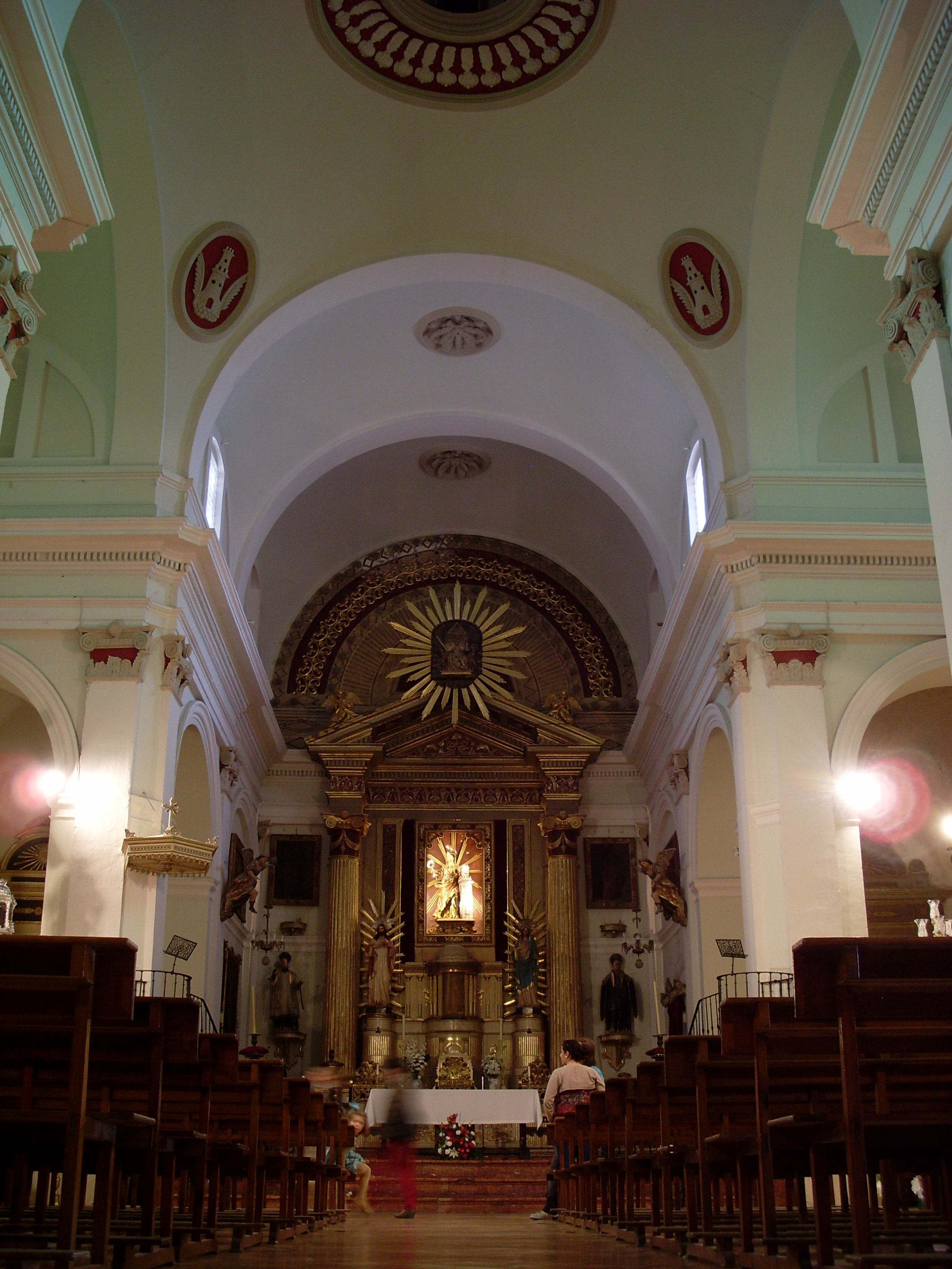 Altar mayor de la iglesia de Sta. Bárbara (Écija)